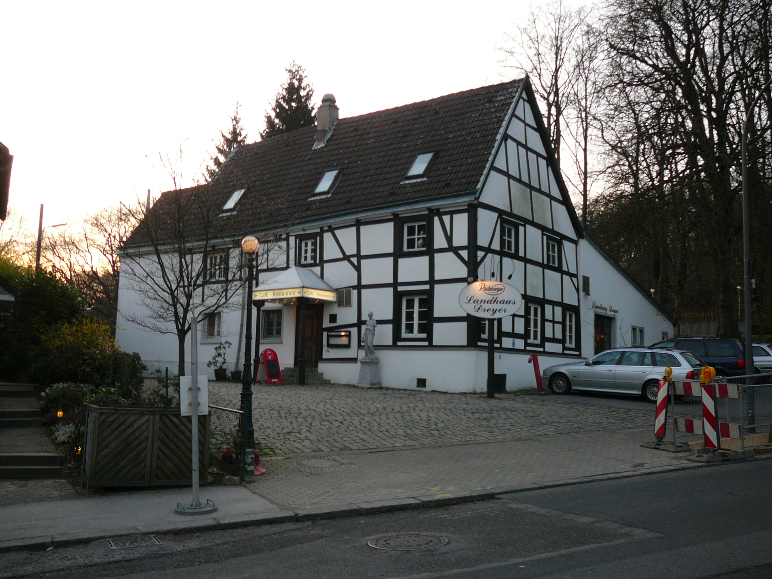 Vogelsangstraße, Wuppertal-Elberfeld